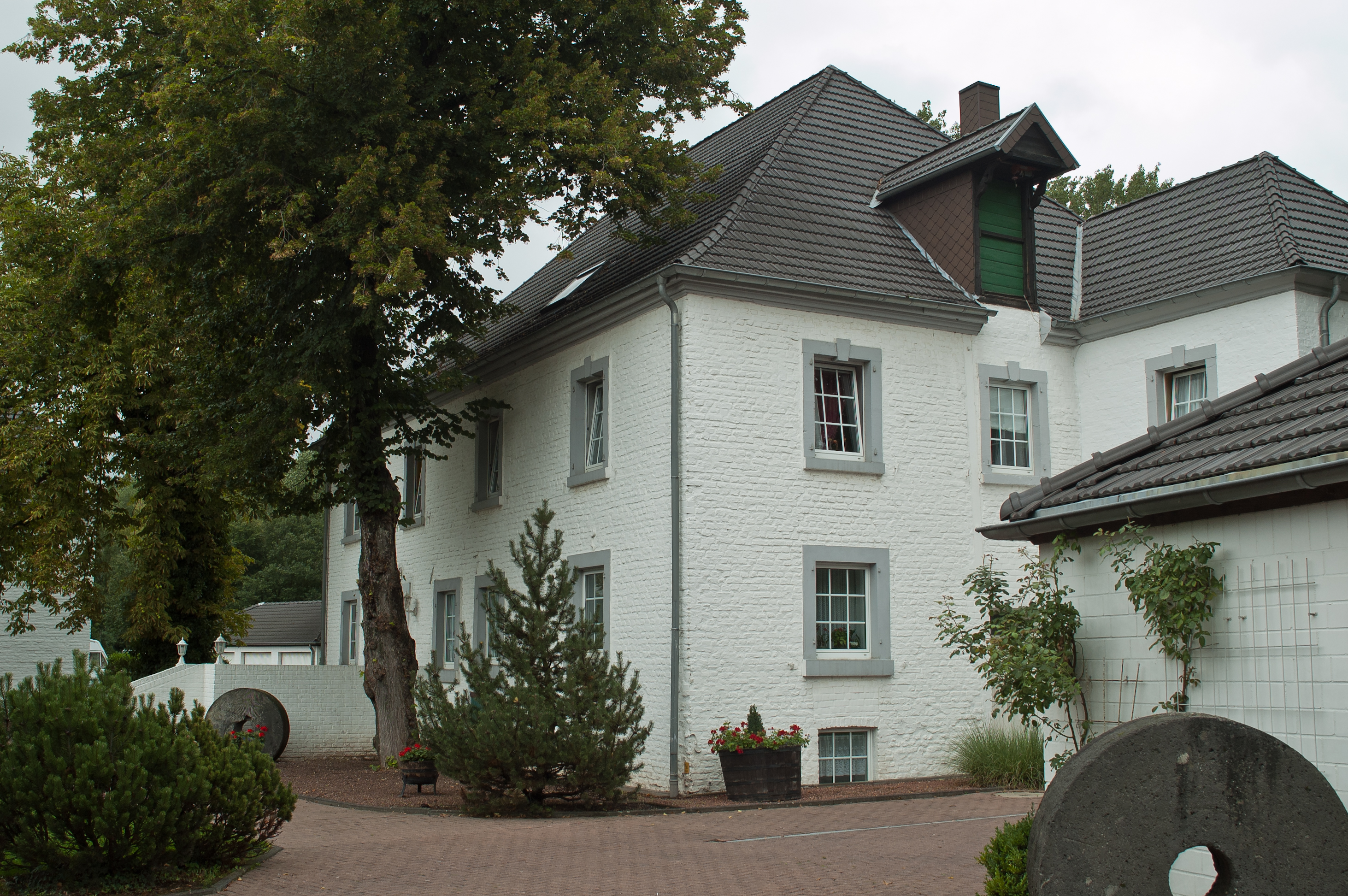 Die Zievericher Mühle in Bergheim-Zieverich, eine frühere, mit Wasserkraft betriebene Öl- und Kornmühle